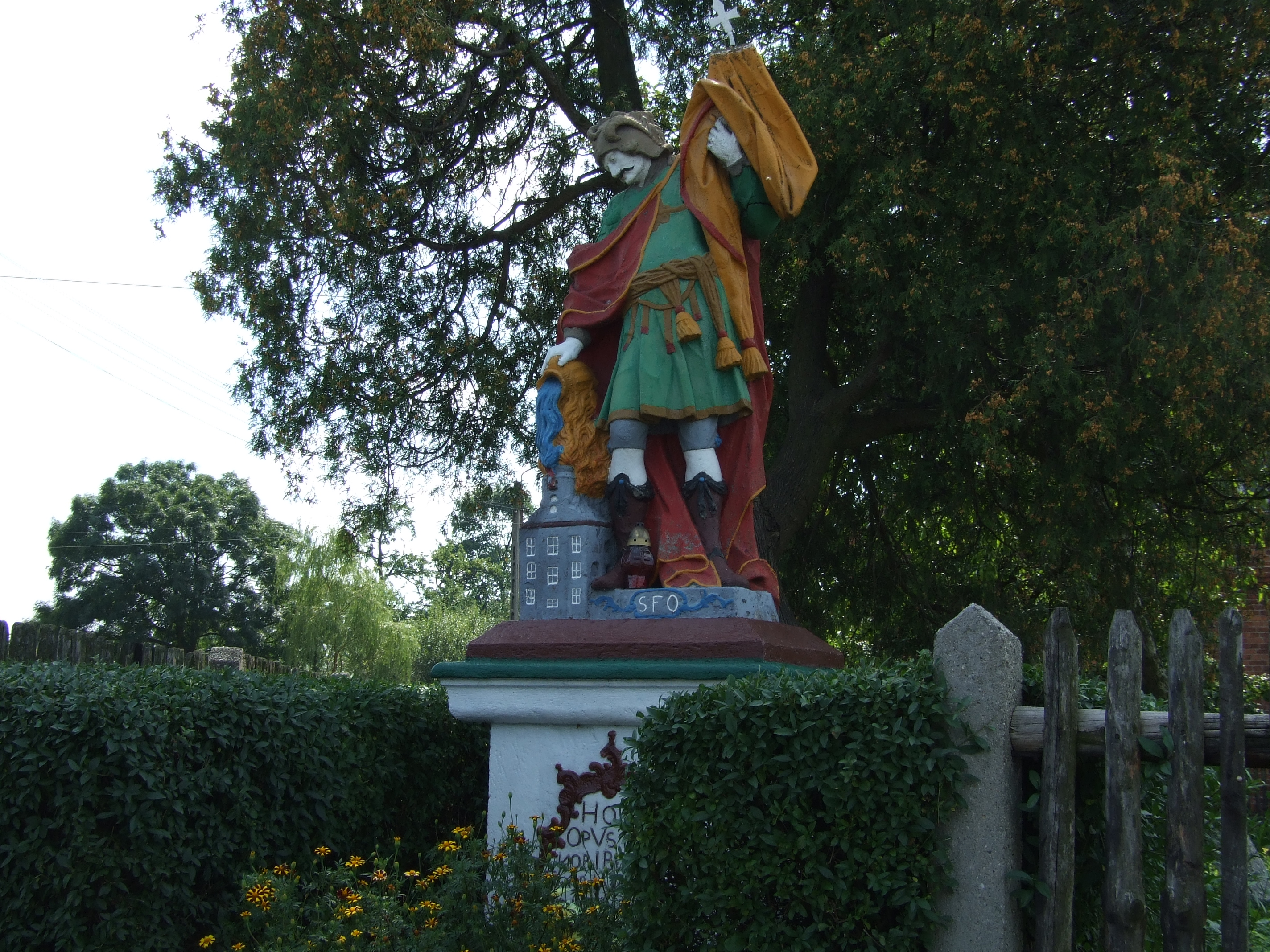 Figura św. Floriana w Bycinie z 1787r.